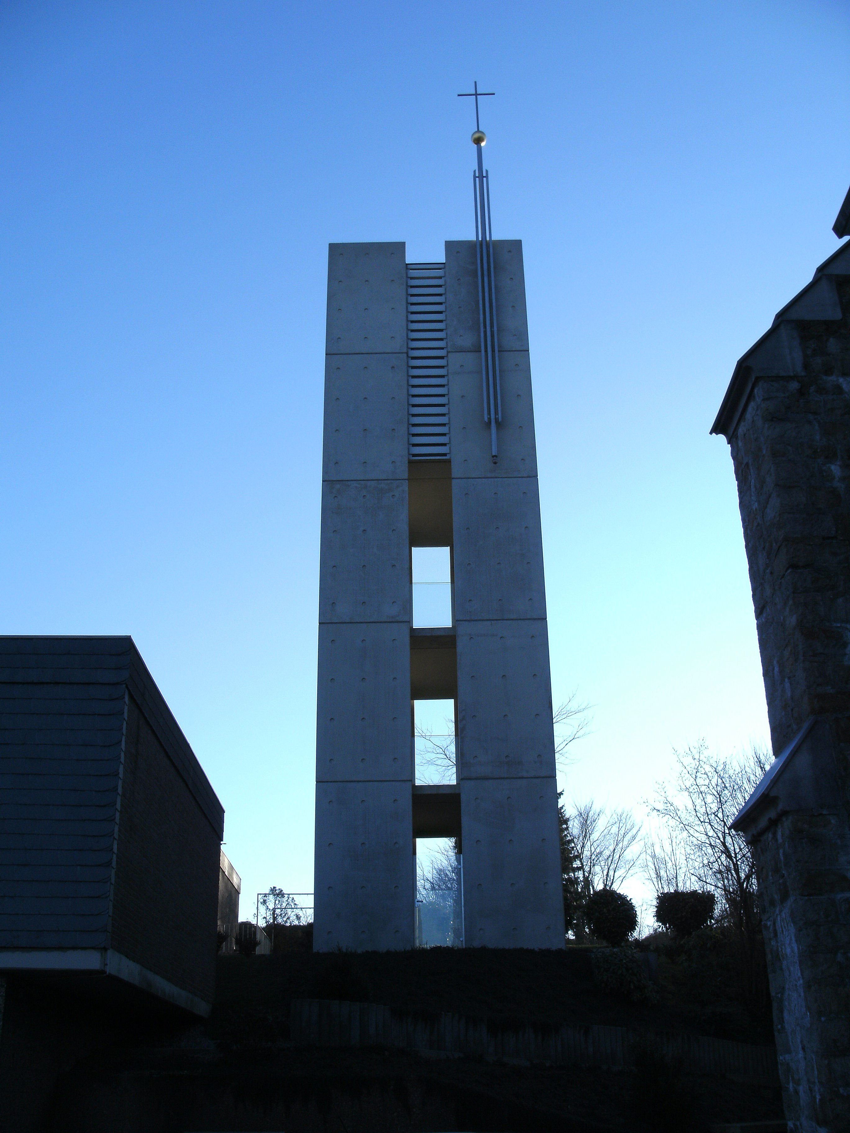 Glockenturm von St. Hubertus, Büsbach